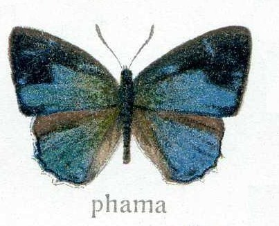 Poritia phama